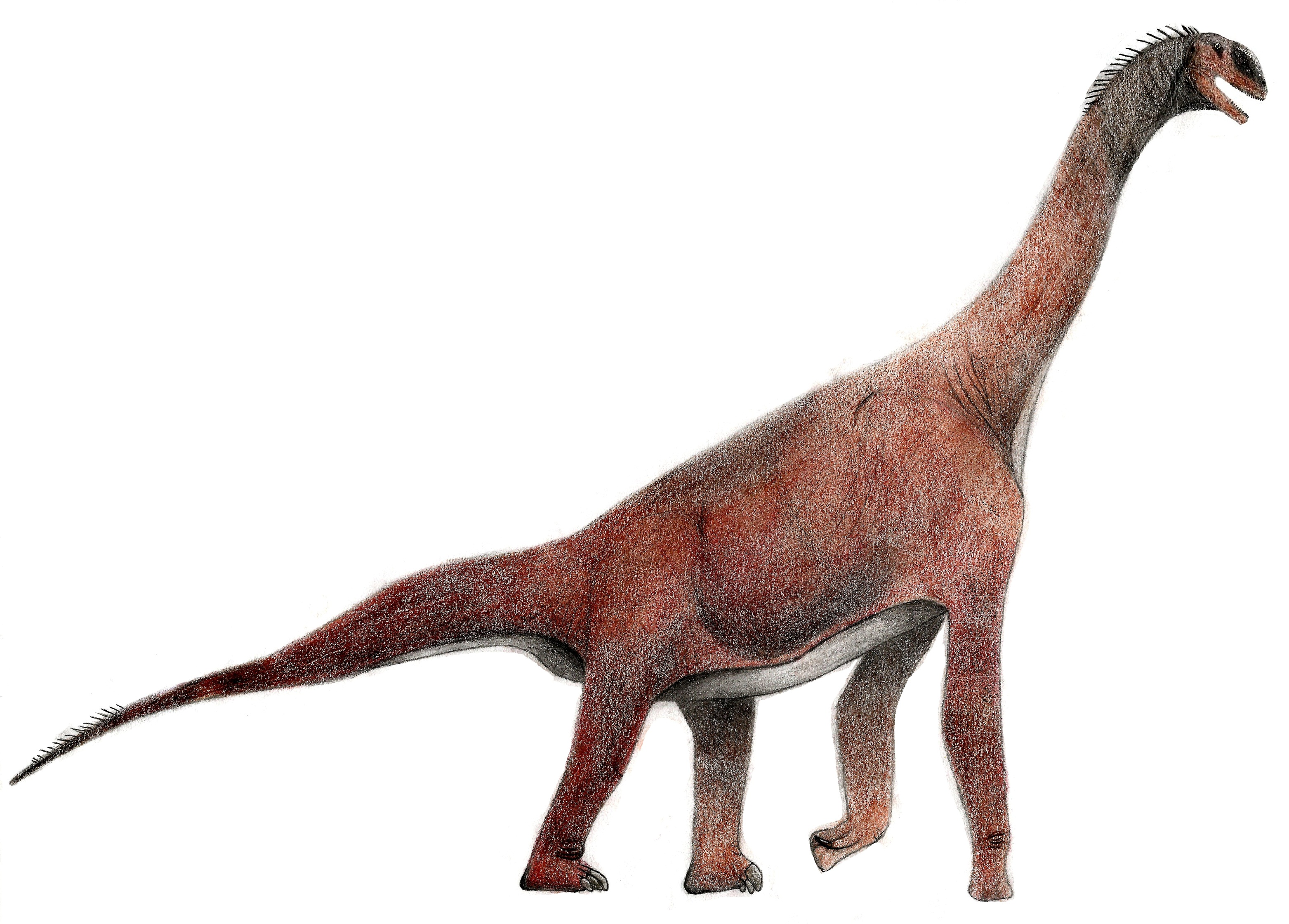 Recreación de Atlasaurus imelakei.